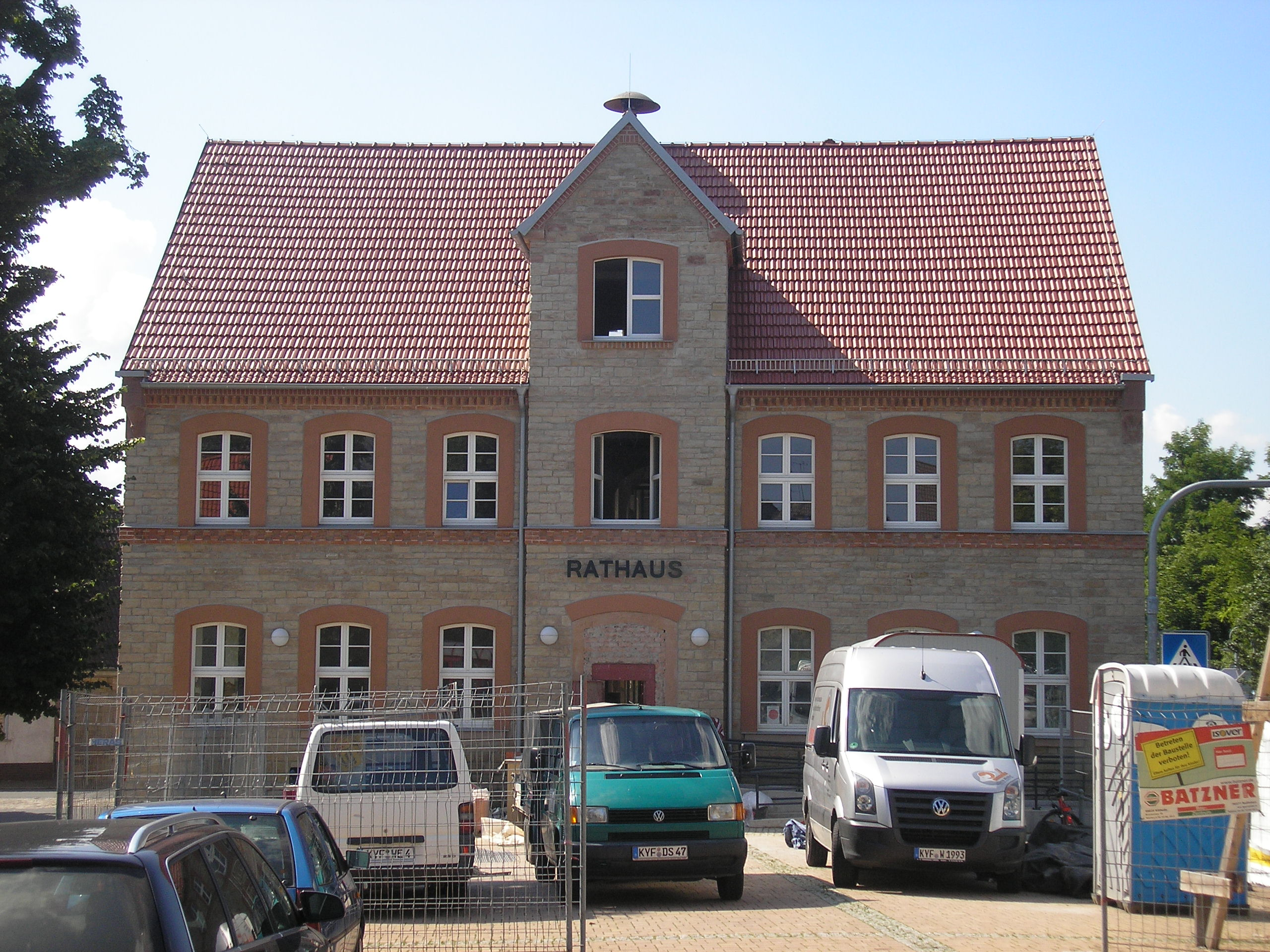 Das Rathaus in Roßleben (Thüringen).